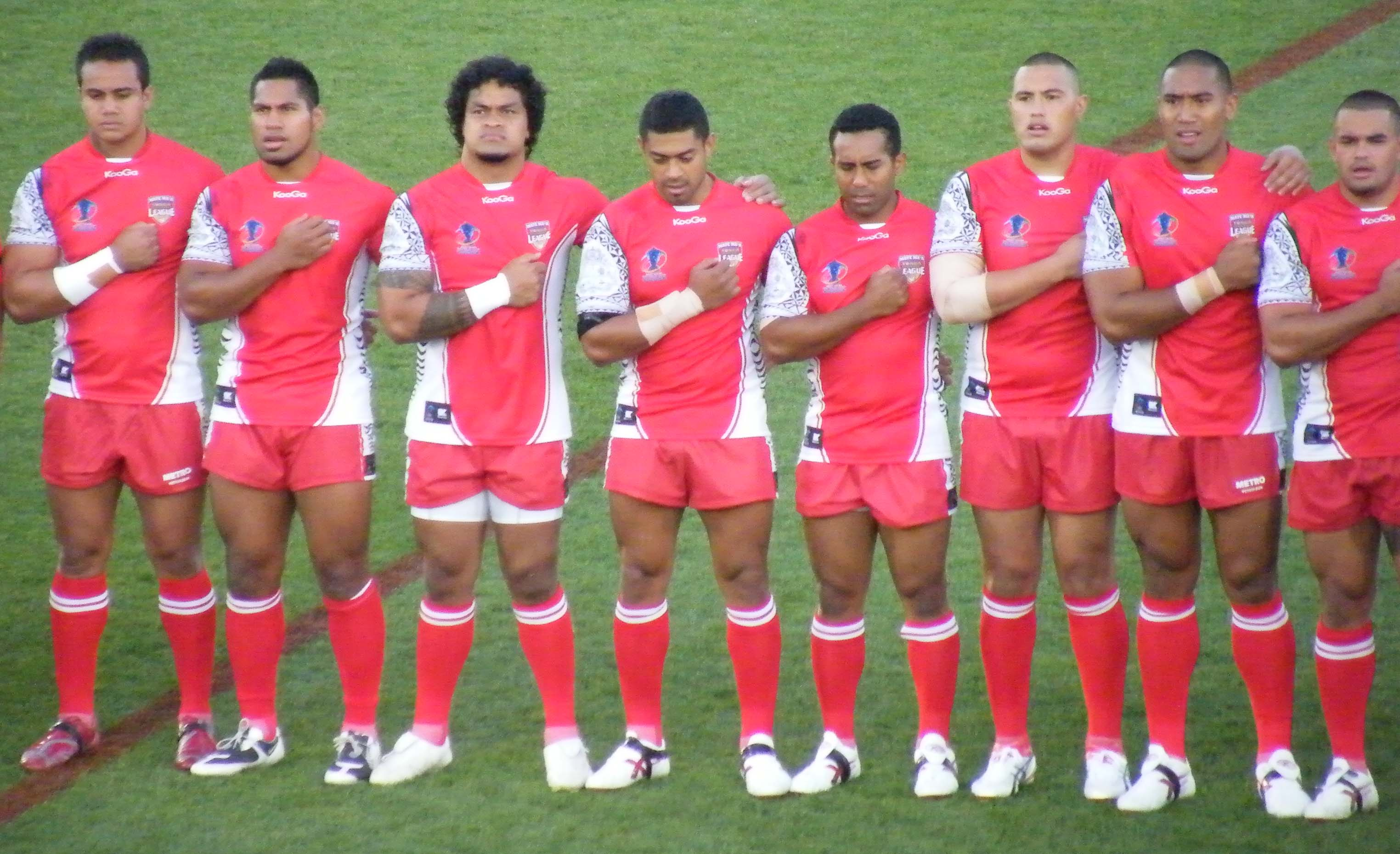 RLWC Tonga v Ireland, Parramatta 2008.